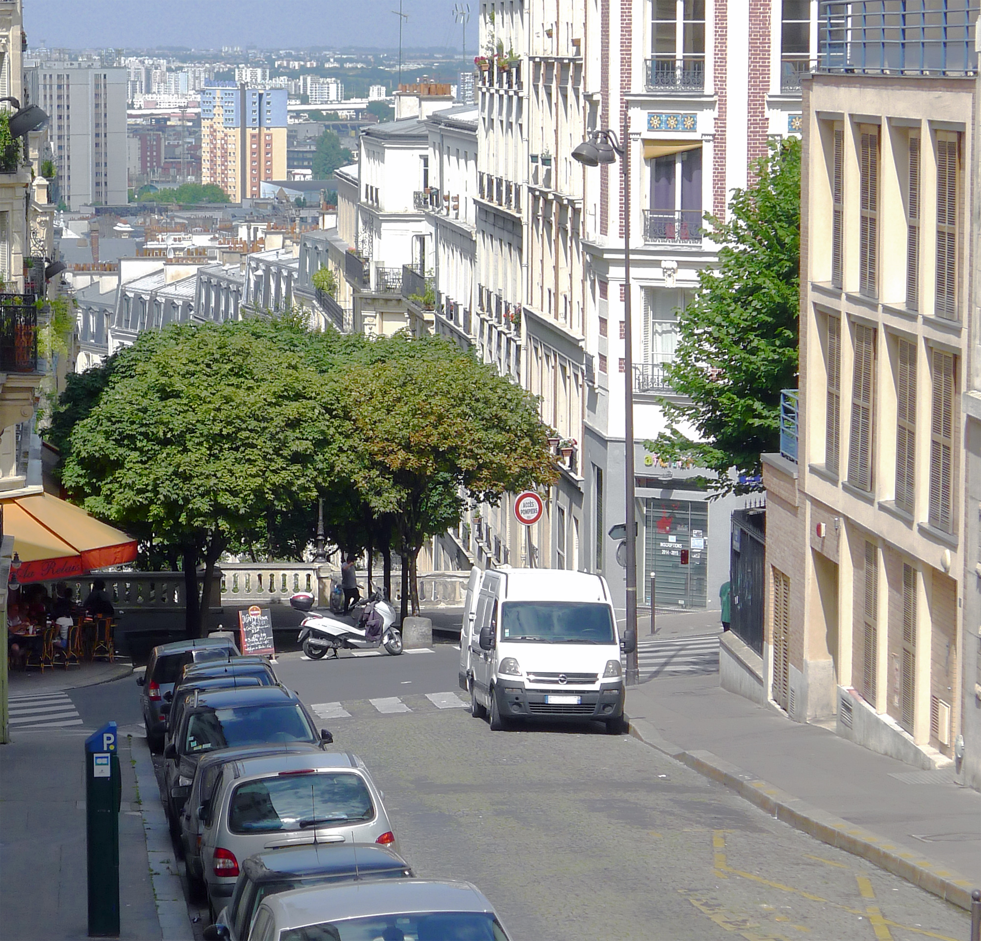 Rue du Mont-Cenis - Paris XVIII